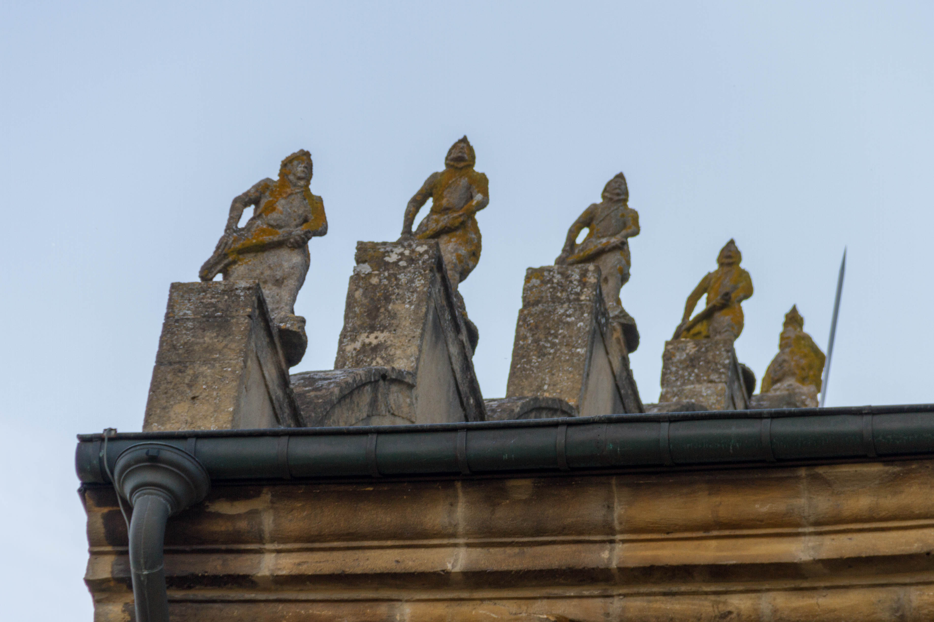 Château de Cons-la-Grandville